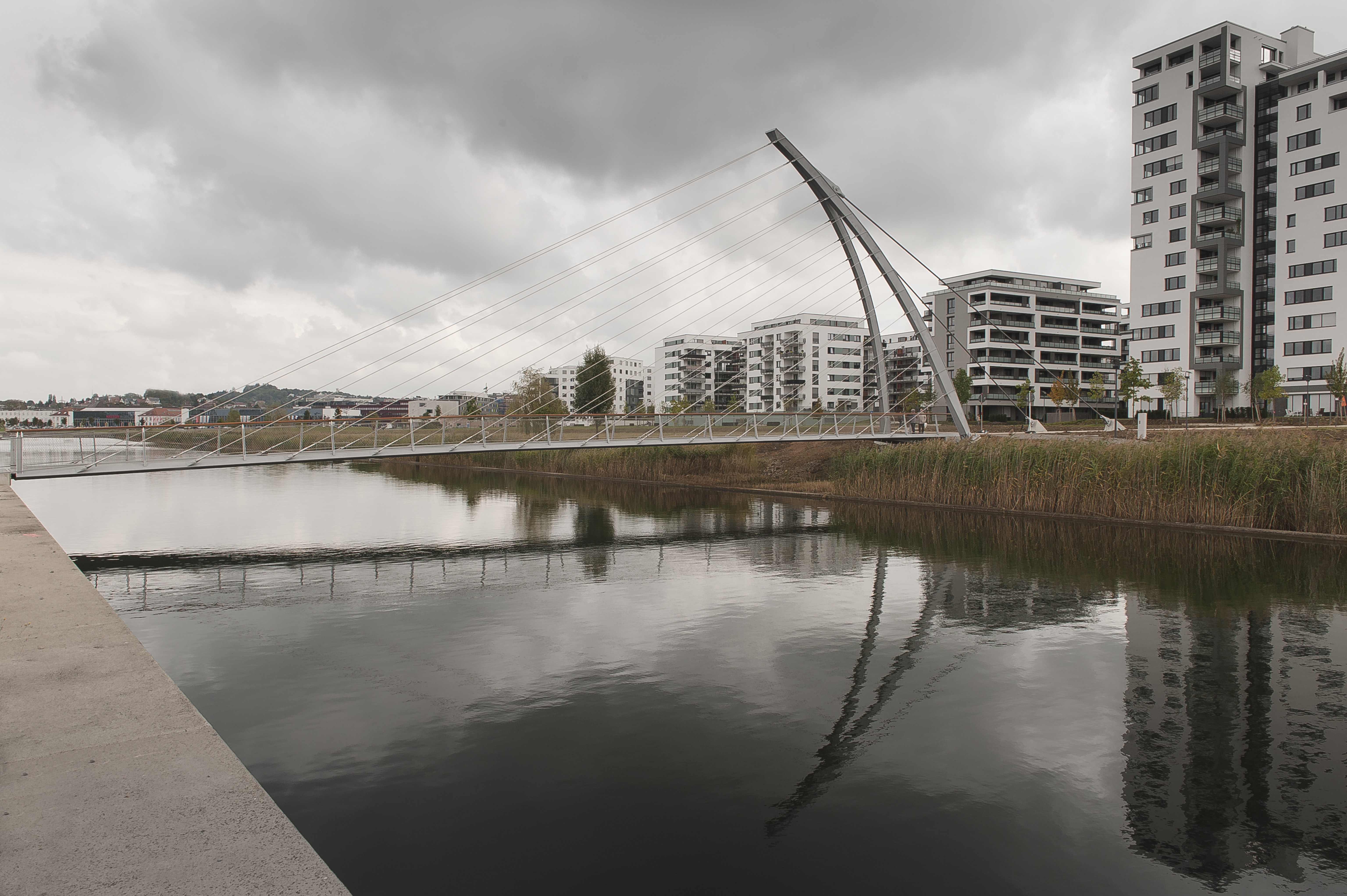 "Harfenbrücke" über den Langen See, Böblingen